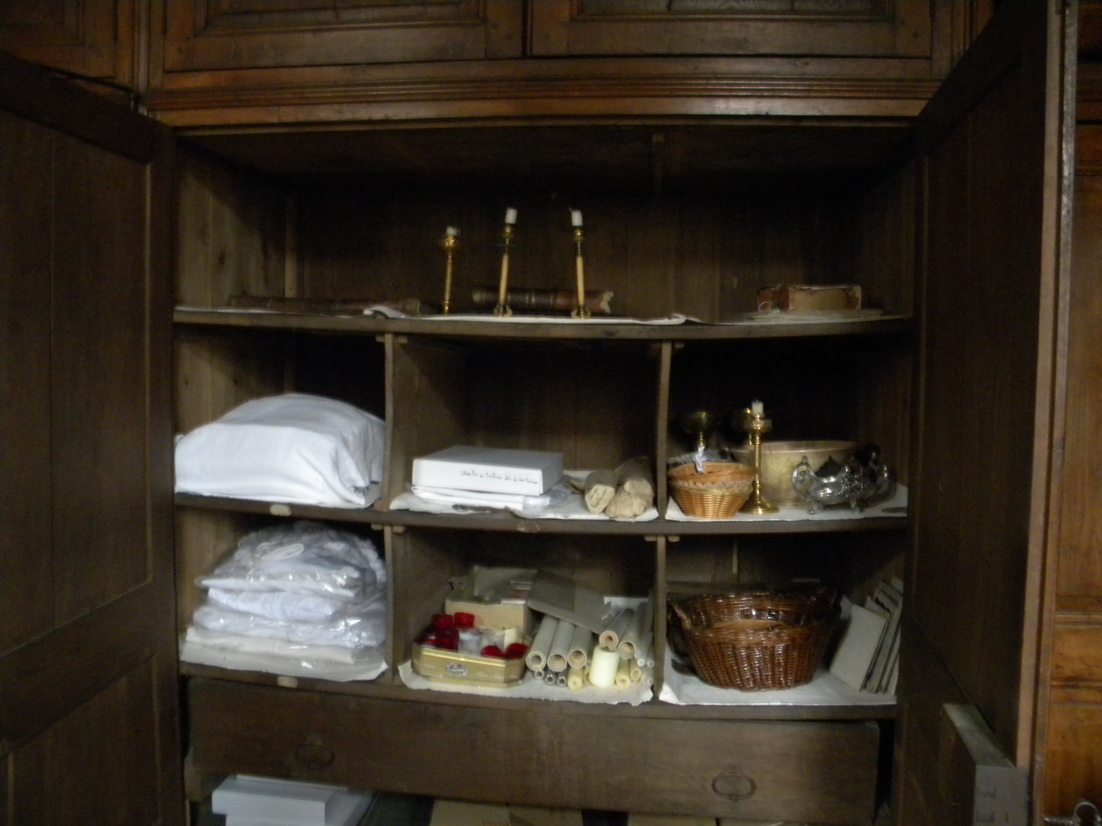 Sacristie de l'église de Corcelles-lès-Arts